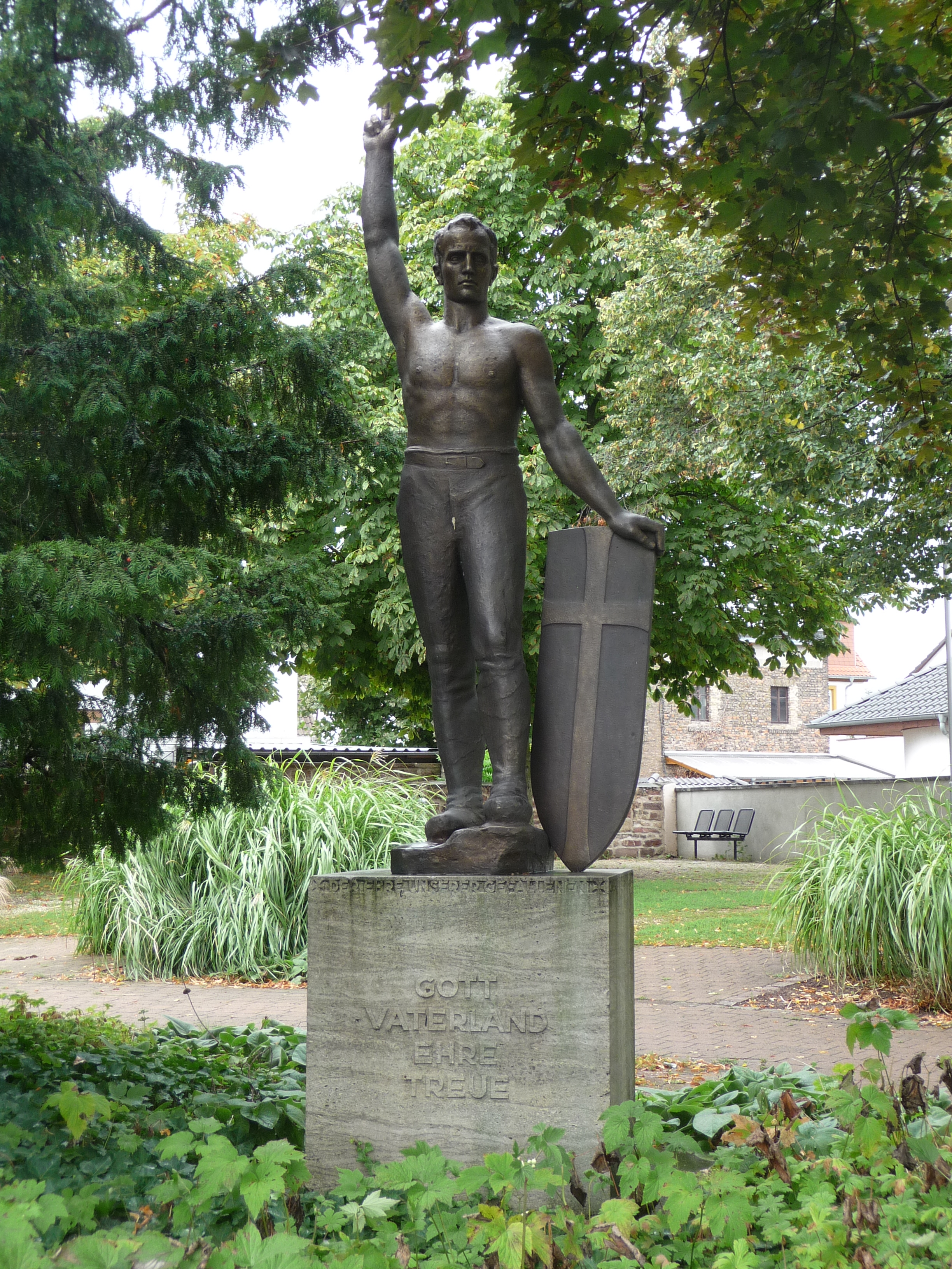 Gaustraße, Ecke Eckenberstraße, Worms-Neuhausen Kriegerdenkmal 1914/18 Bronzefigur auf Steinsockel, 1930/37, Bildhauer David Fahrner, Freudenstadt